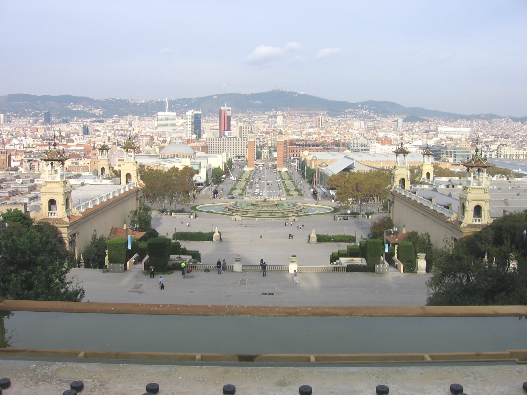 Vista desde el Palacio Nacional de Montjuïc (Barcelona)